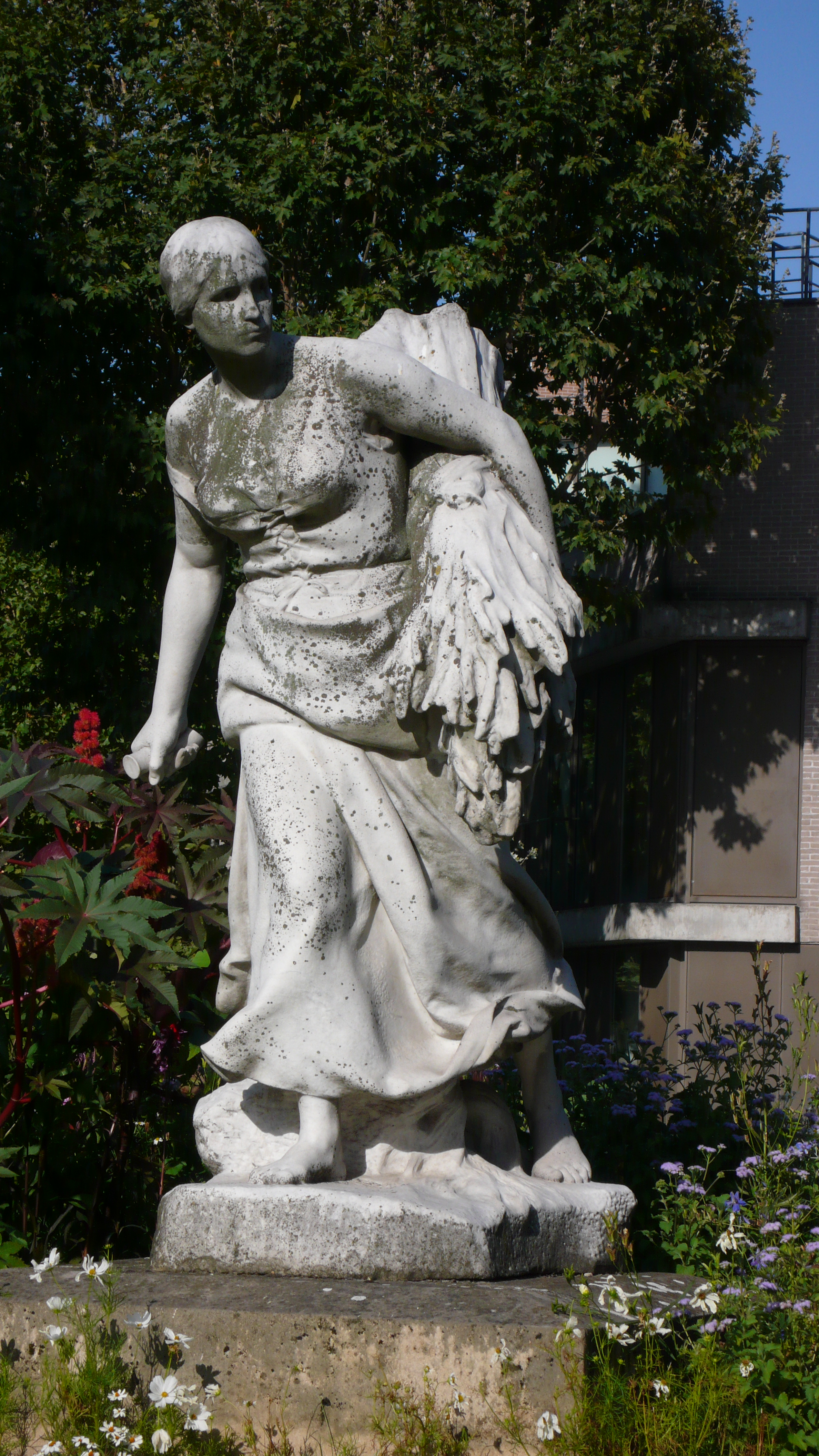 En moisson, 1891, de Léon Deschamps (1860-1928), copie place Rhin-et-Danube, Paris. Données tech. voir EXIF.